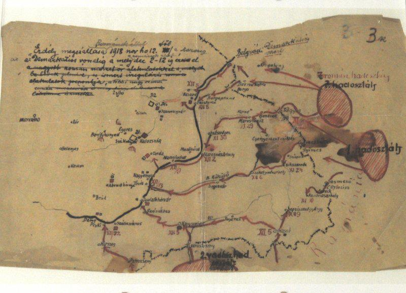 Ismeretlen fényképész felvétele. Székely Hadosztály. Forrás